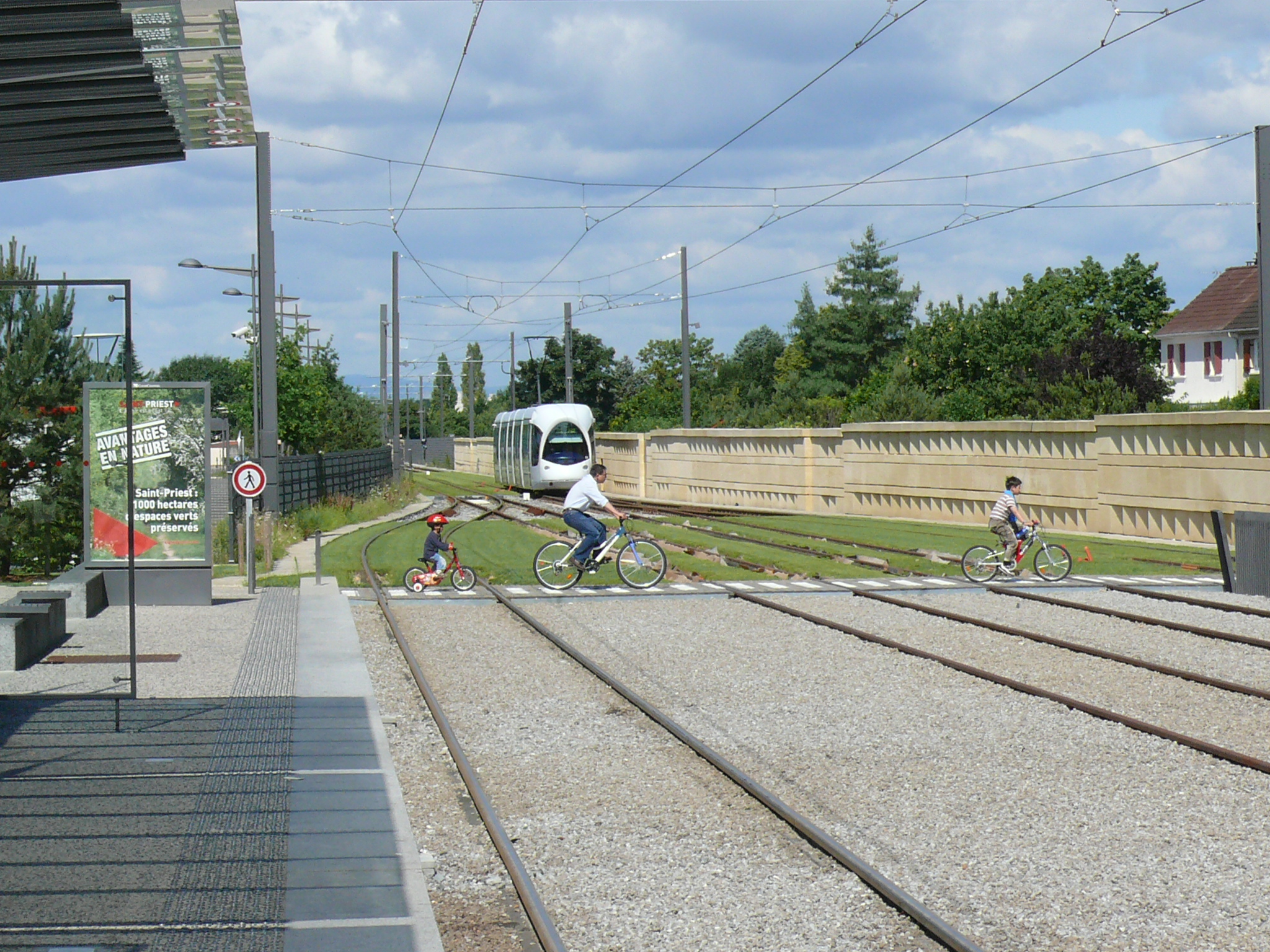 Tramway de Lyon - Ligne T3 - Station Meyzieu Gare Les deux voies centrales sont réservées à la liaison rail aéroport desservant l'aéroport Lyon-Saint-Exupéry par un service de tramway express dit Leslys puis Rhônexpress